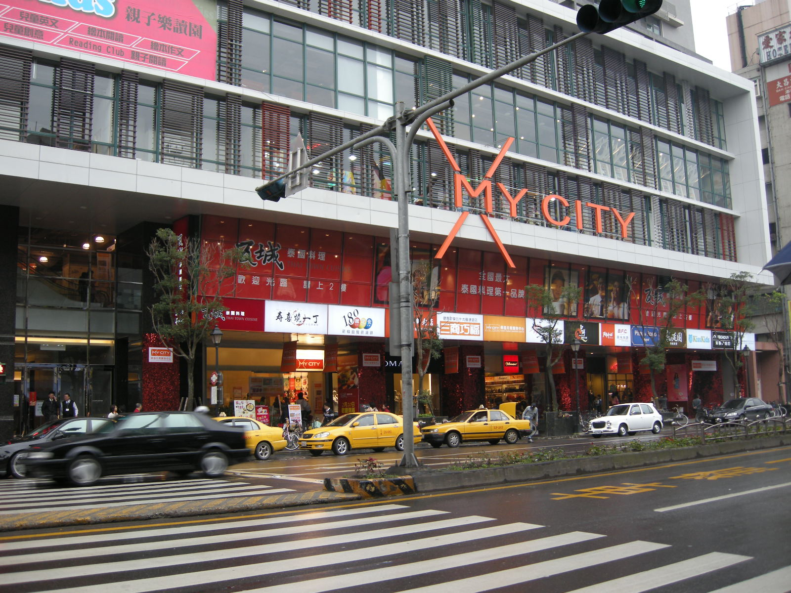 新北市新店區臺北捷運新店線七張站附近的裕隆生活城。